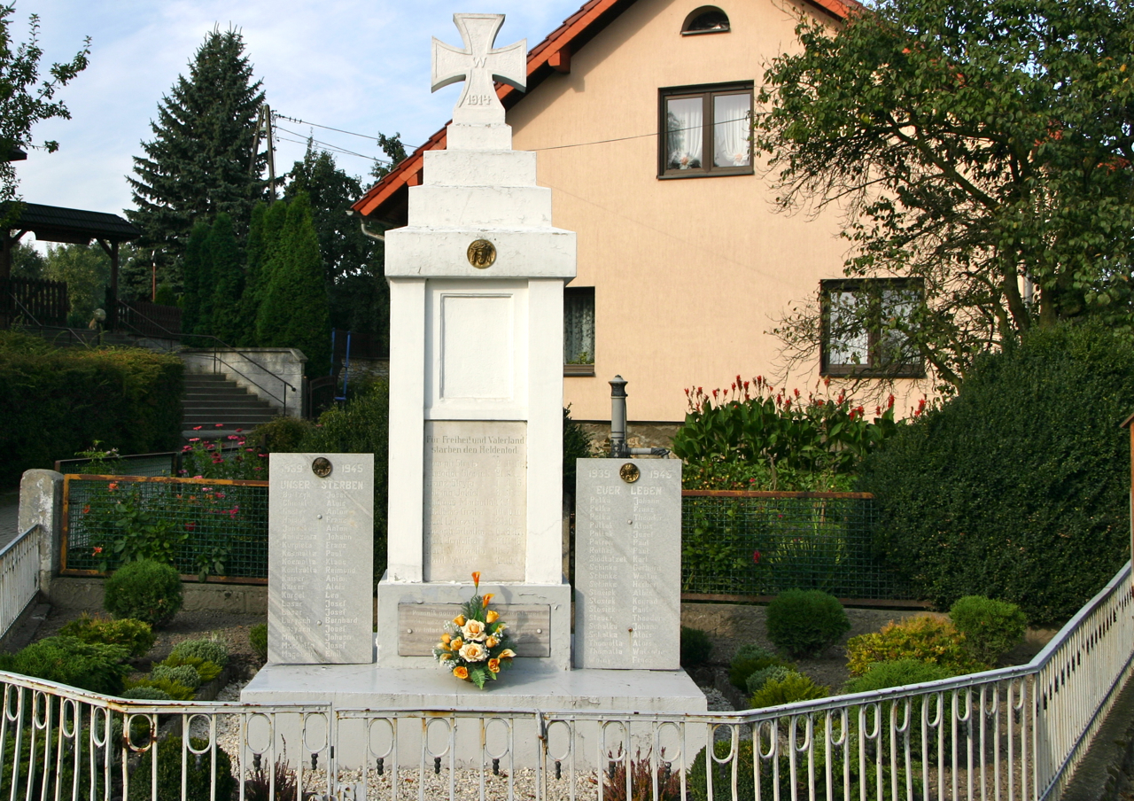 Rzepcze (dodatkowa nazwa w j. niem. Repsch) – wieś w Polsce położona w województwie opolskim, w w powiecie prudnickim, w gminie Głogówek.